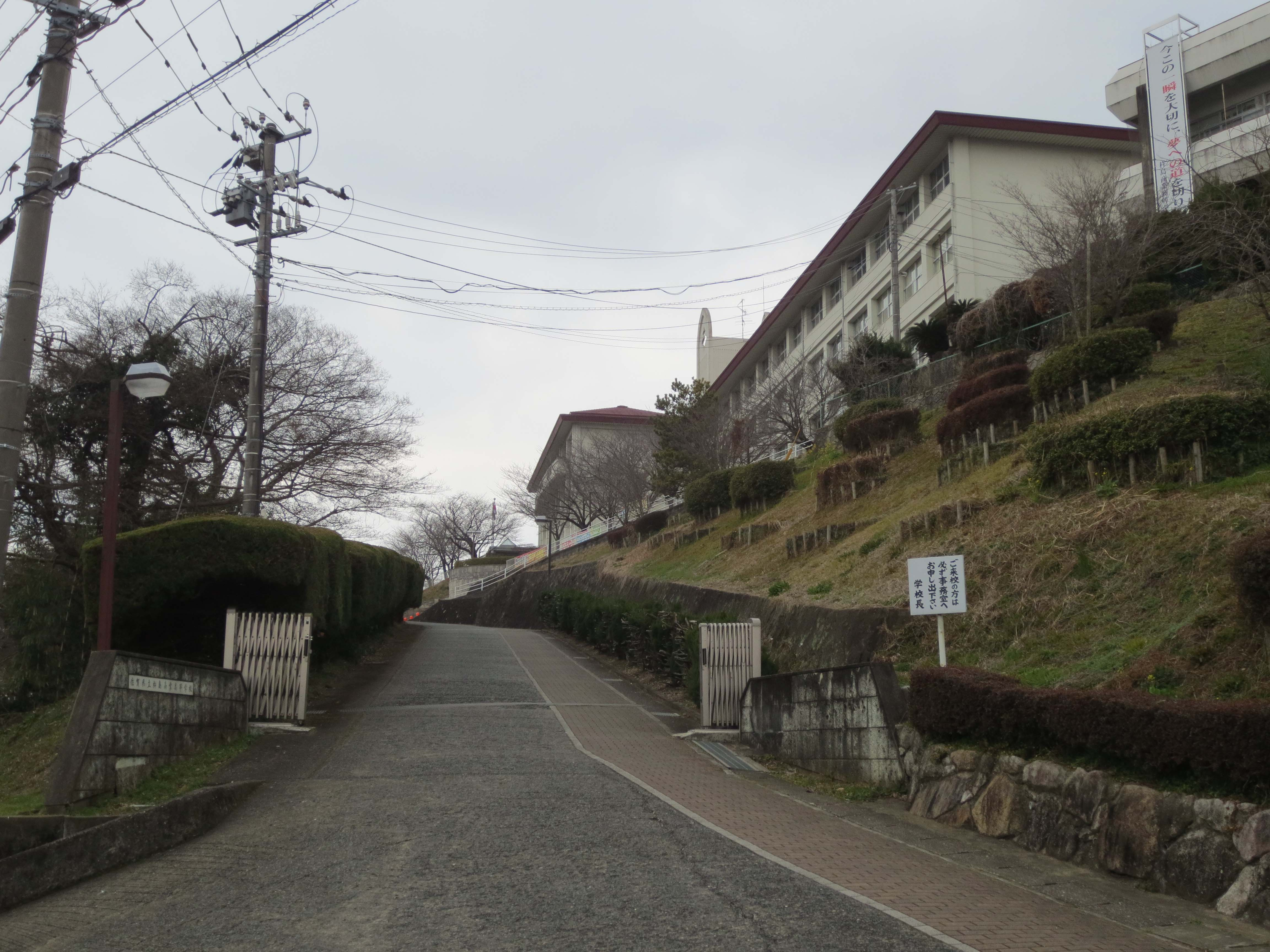 杵島商業高校正門